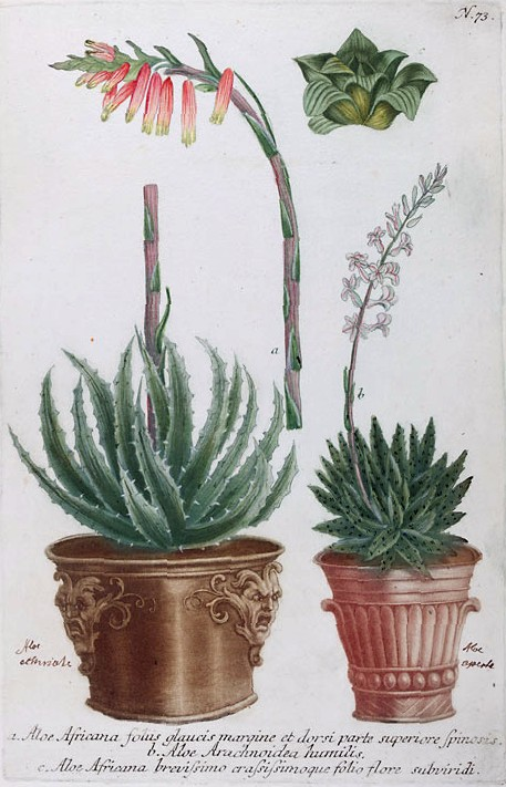 Plate N73